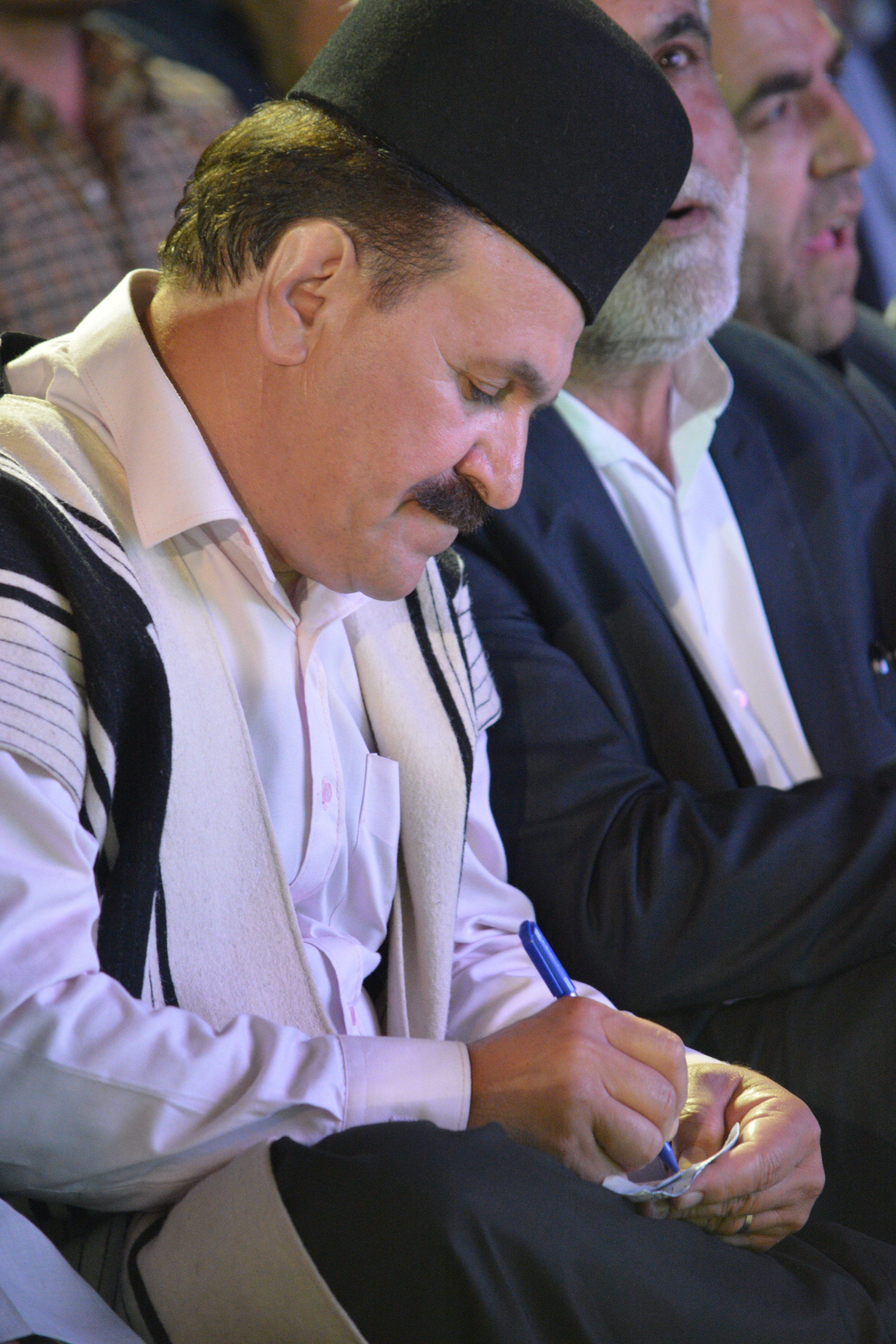 کوروش اسد پور در جشنواره نیمه شبعان باغملک اردیبهشت 1397